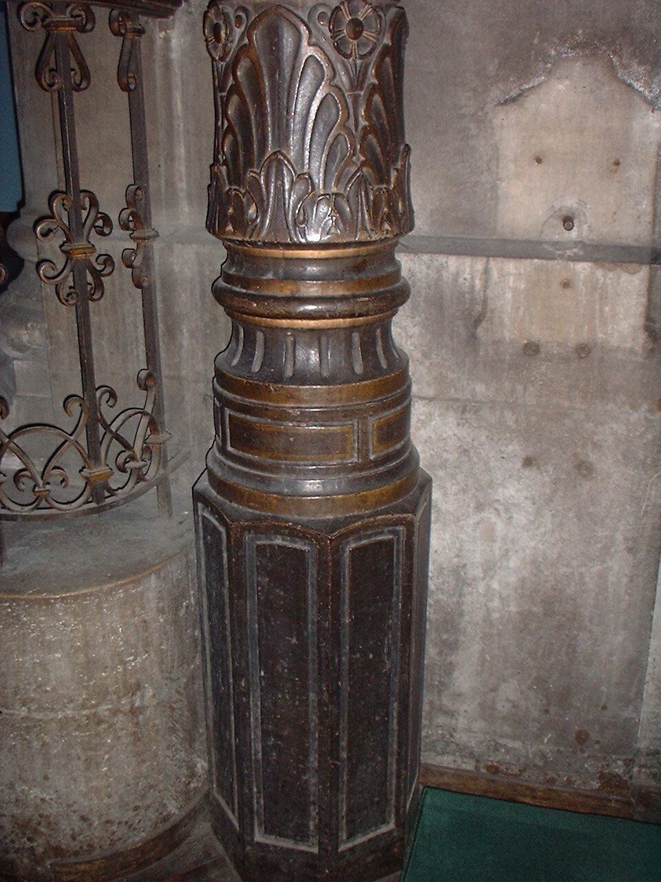 Base d'un poteau de fonte interieur de l'église St Augustin à Paris